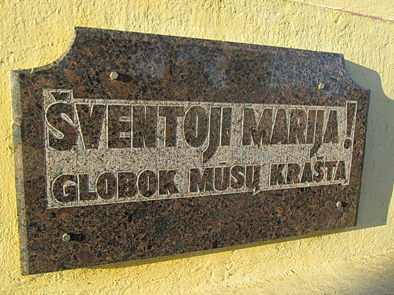 Вайнюны. Каплічка. Літоўская шыльда